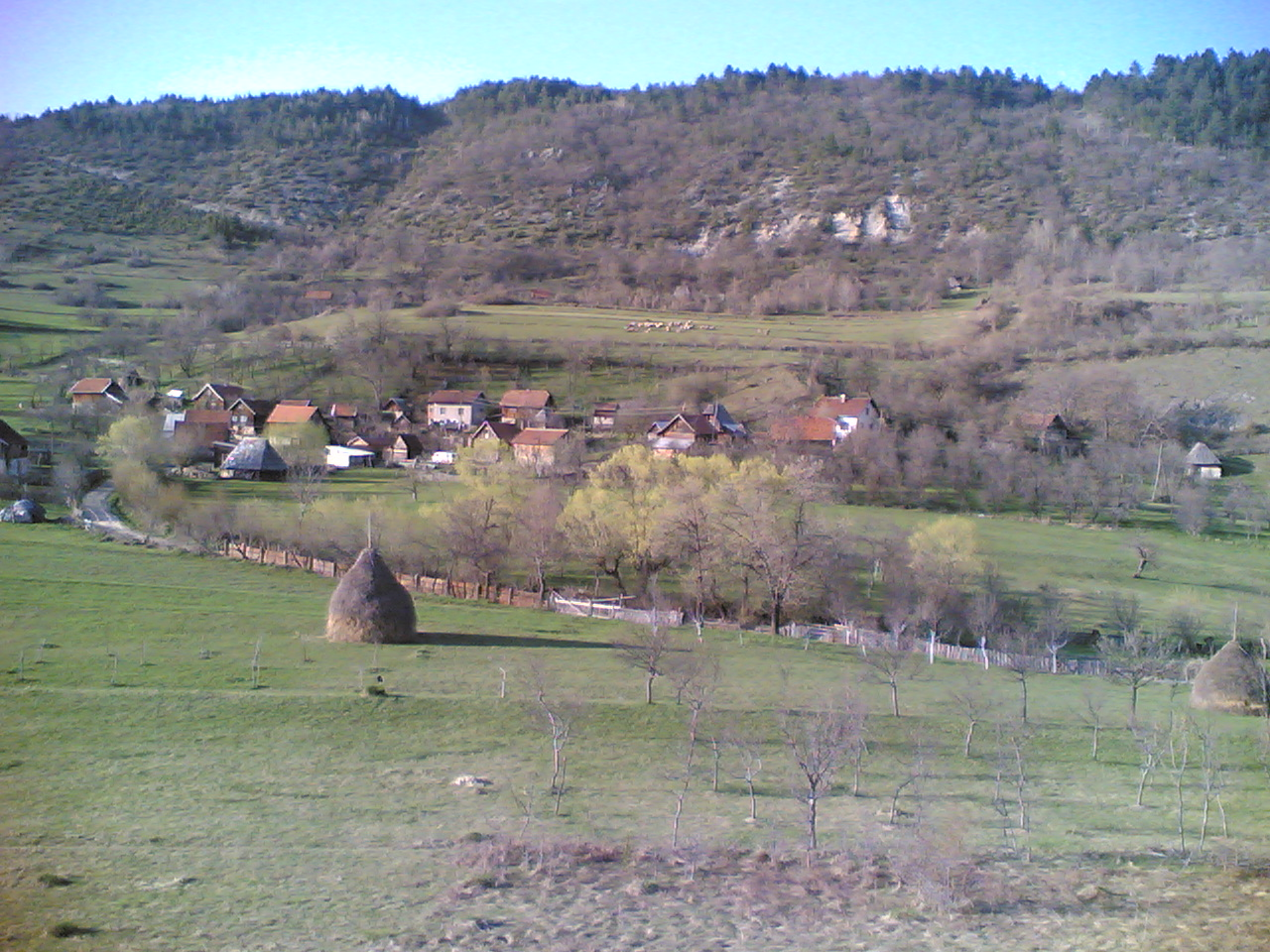 Аутор: Александар Мандић